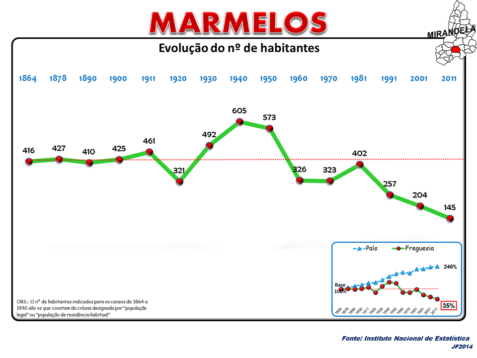 Evolução da População 1864 / 2011